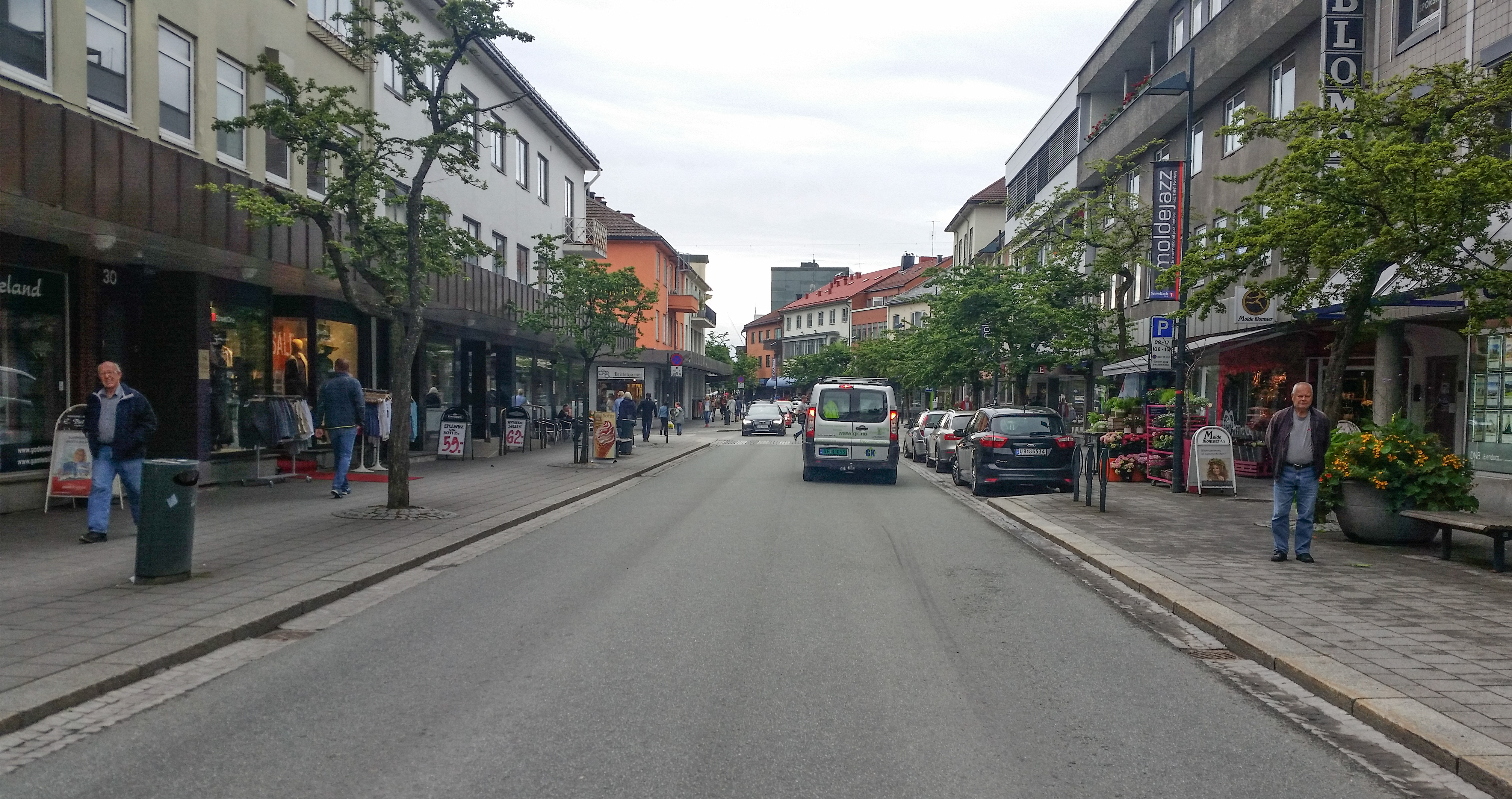 Storgata i Molde, fylkesveg 400